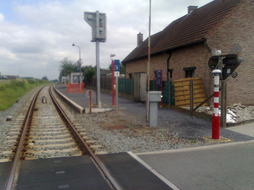 Station van Bambrugge (in Erpe-Mere)